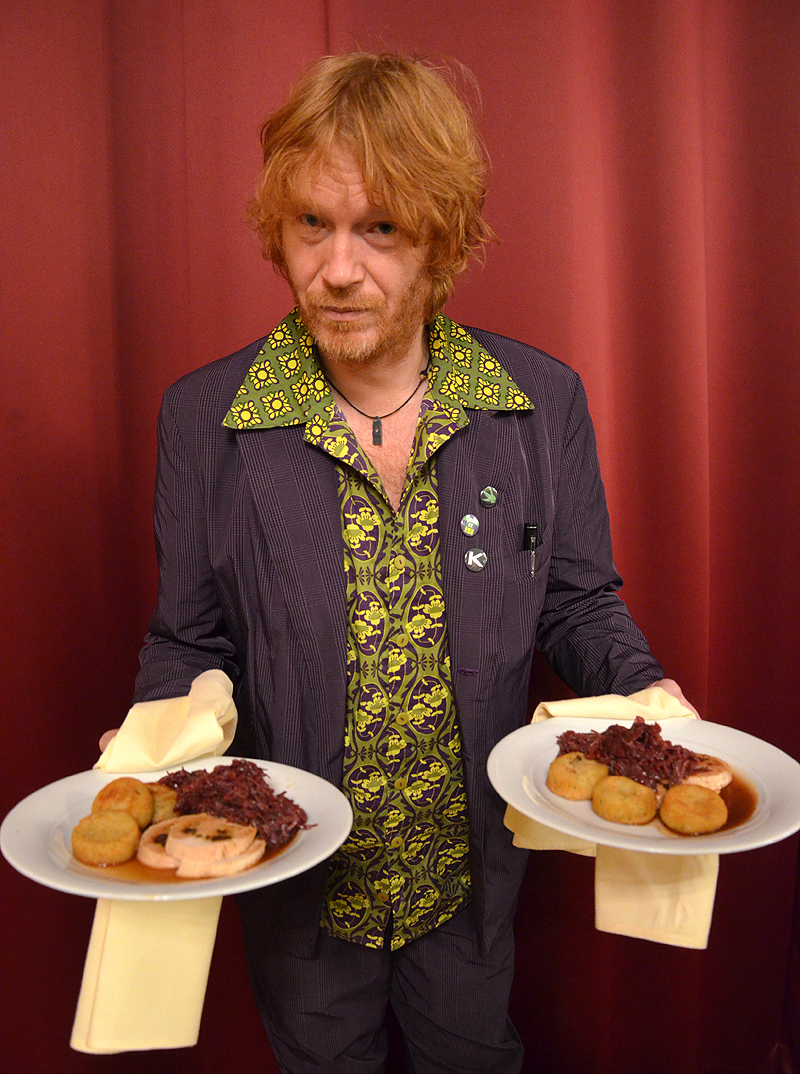 Wie alle Künstler für das Fest Die!!! Weihnachtsfeier für Obdachlose und Bedürftige in Hannover arbeitete auch der Initiator der Feier, Wohnraumhelden-Musiker und Ex-Fury in the Slaughterhouse-Sänger C-Punkt Stein-Schneider (Christof Stein-Schneider) auch in diesem Jahr unentgeltlich, laut der Zeitung Neue Presse vom 16. Dezember 2013 jedoch „zum ersten Mal im Leben als Tellertaxi“ ...